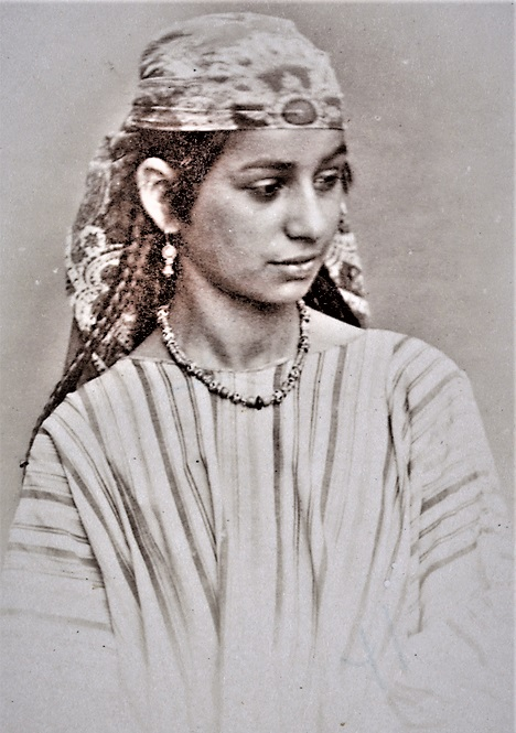 Портрет молодой еврейки по имени Малка.